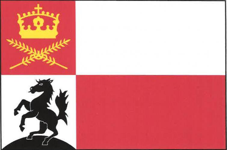 Černilov vlajka